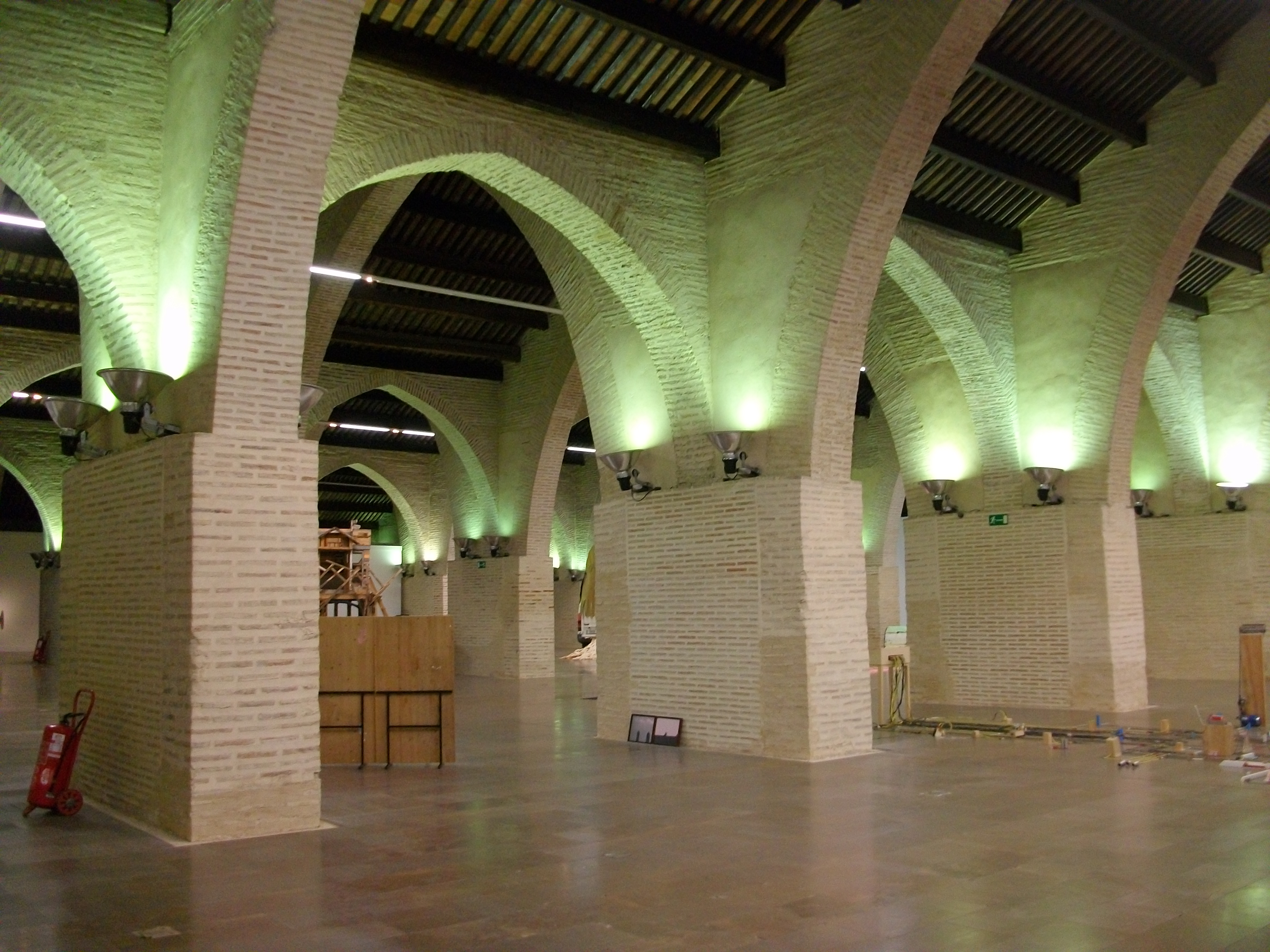 Vista de l'interior de les drassanes del Grau de València, País Valencià.